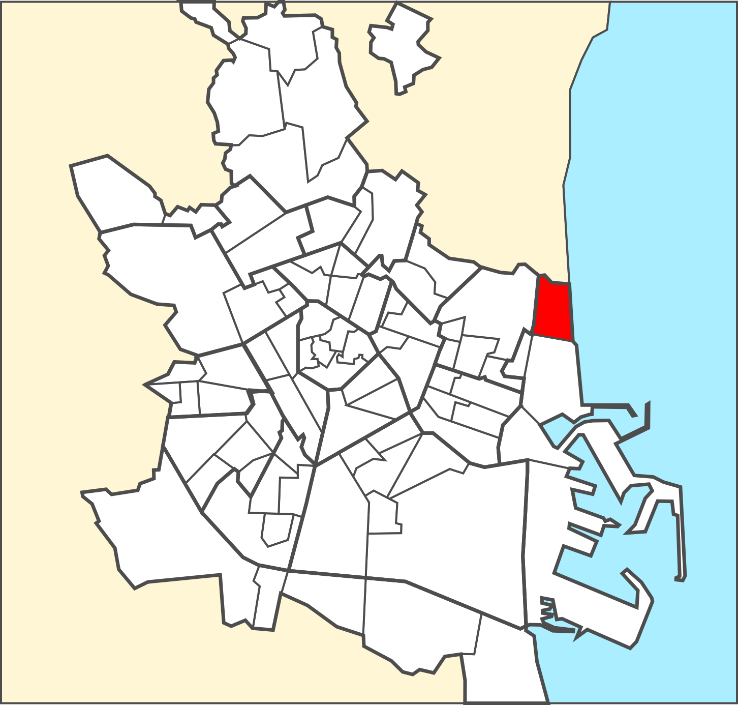 Localització del barri dins de la ciutat de València.